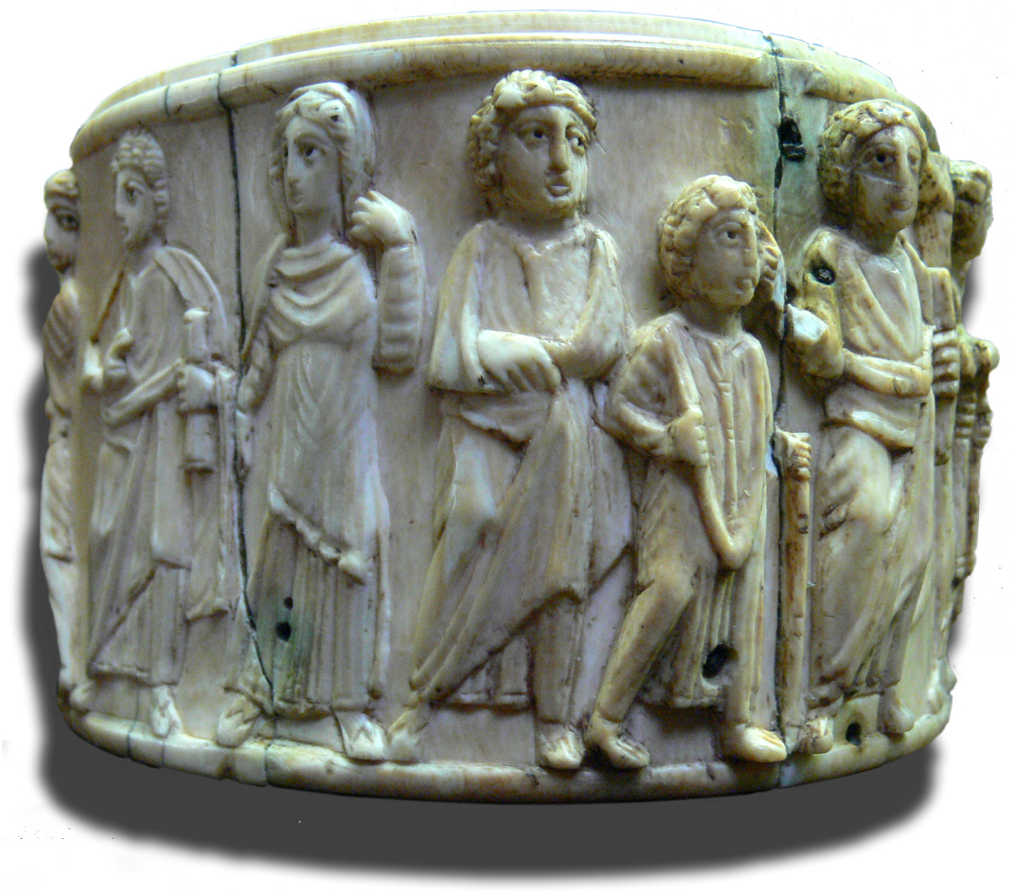 Ivoire byzantin, du Vème au VIème siècle, Pixyde avec Scènes de la vie du Christ Photographié lors de l'exposition : Celtes et Scandinaves, rencontres artistiques, VIIe-XIIe siècle, 1er octobre 2008 - 12 janvier 2009, Musée national du moyen-âge - thermes et hôtel de Cluny (photographie autorisée dans le musée et l'exposition, avec une restriction : sans flash).